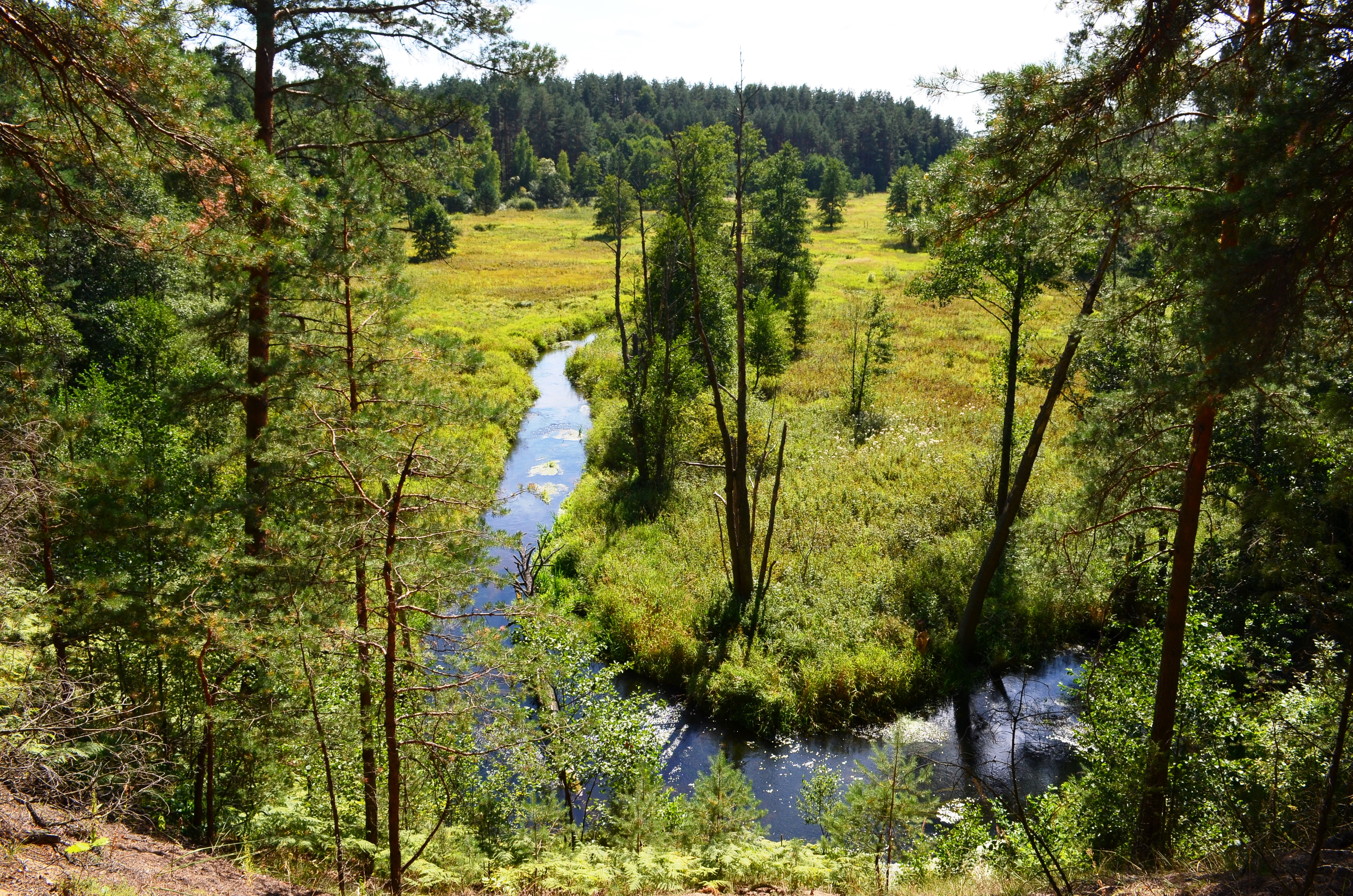 Grūdos vingis Marcinkonių apylinkėse, Varėnos r.